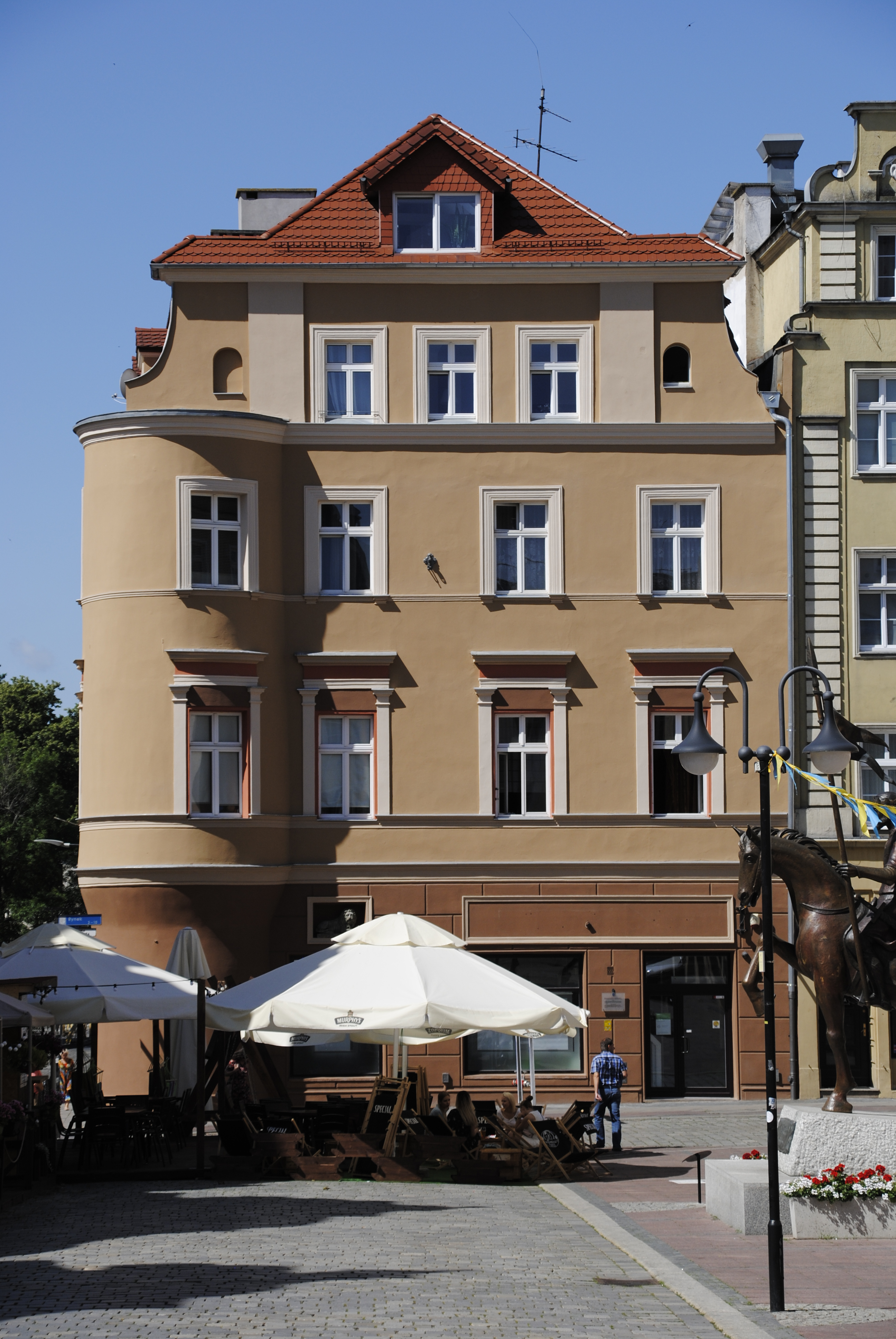 Das Fürstenhaus am Ring Nr. 1 in Oppeln